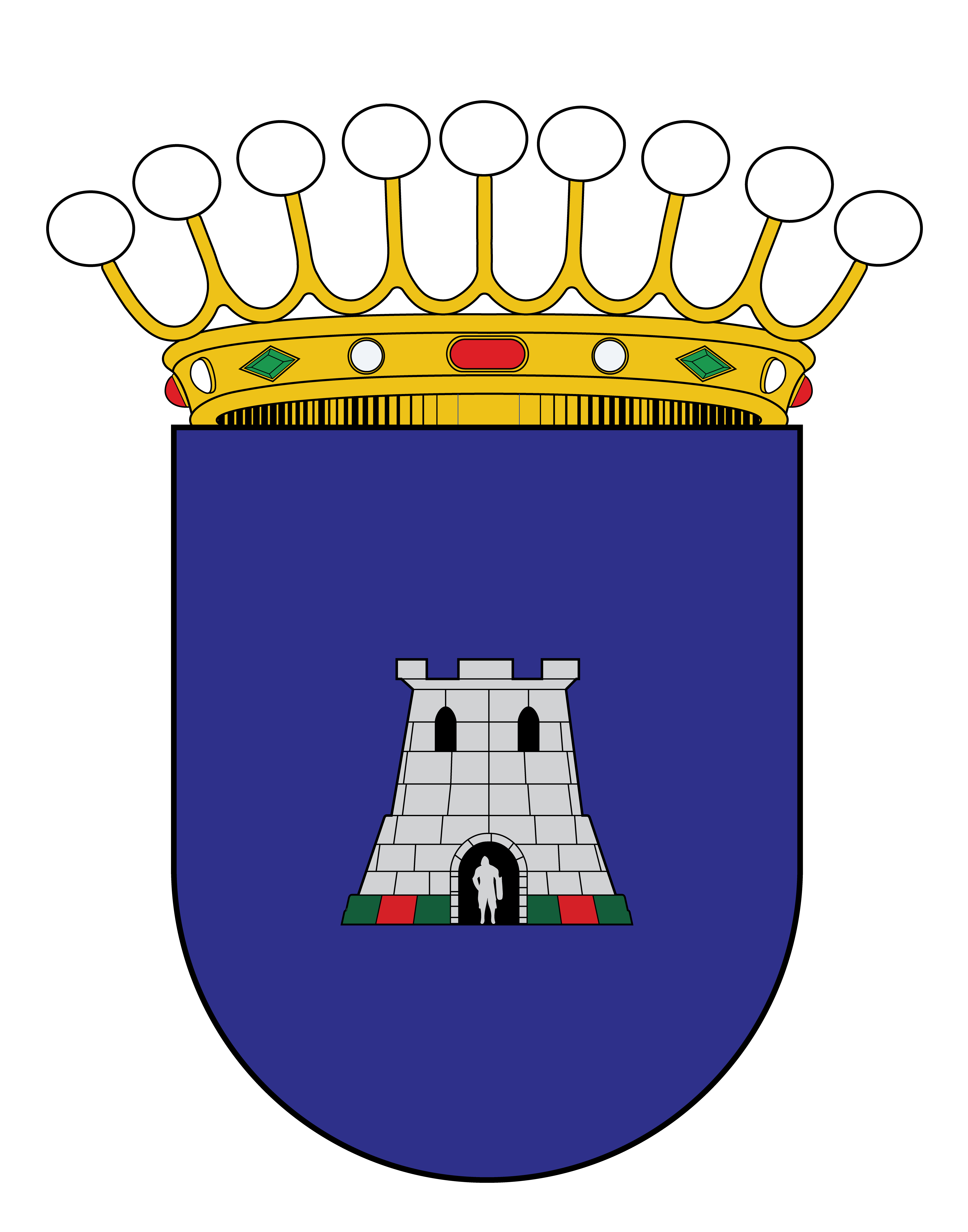 Escudo de la Casa de Luzárraga y Echezuria